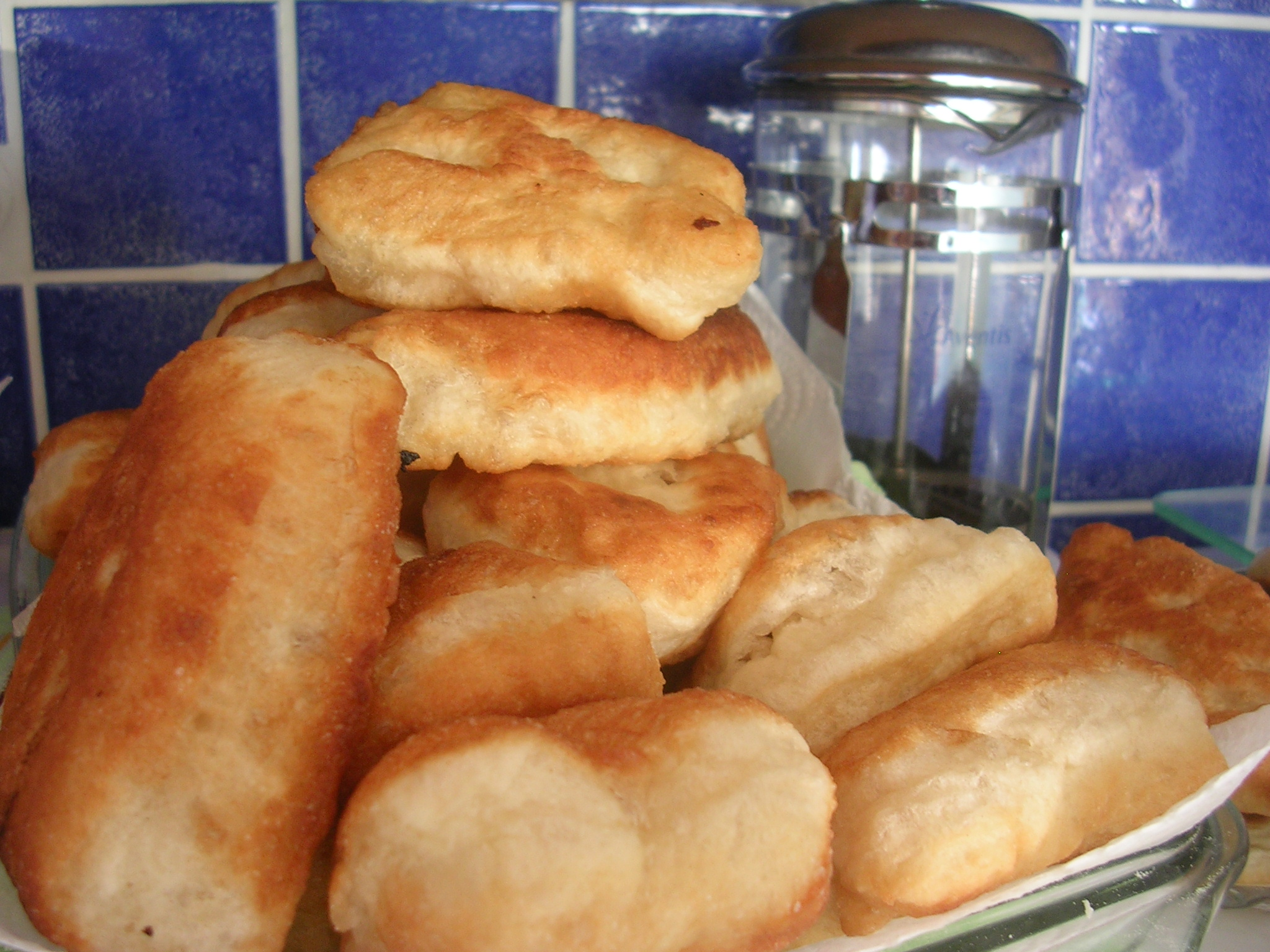 honacan eseridir.